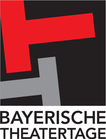 Logo der Bayerischen Theatertage